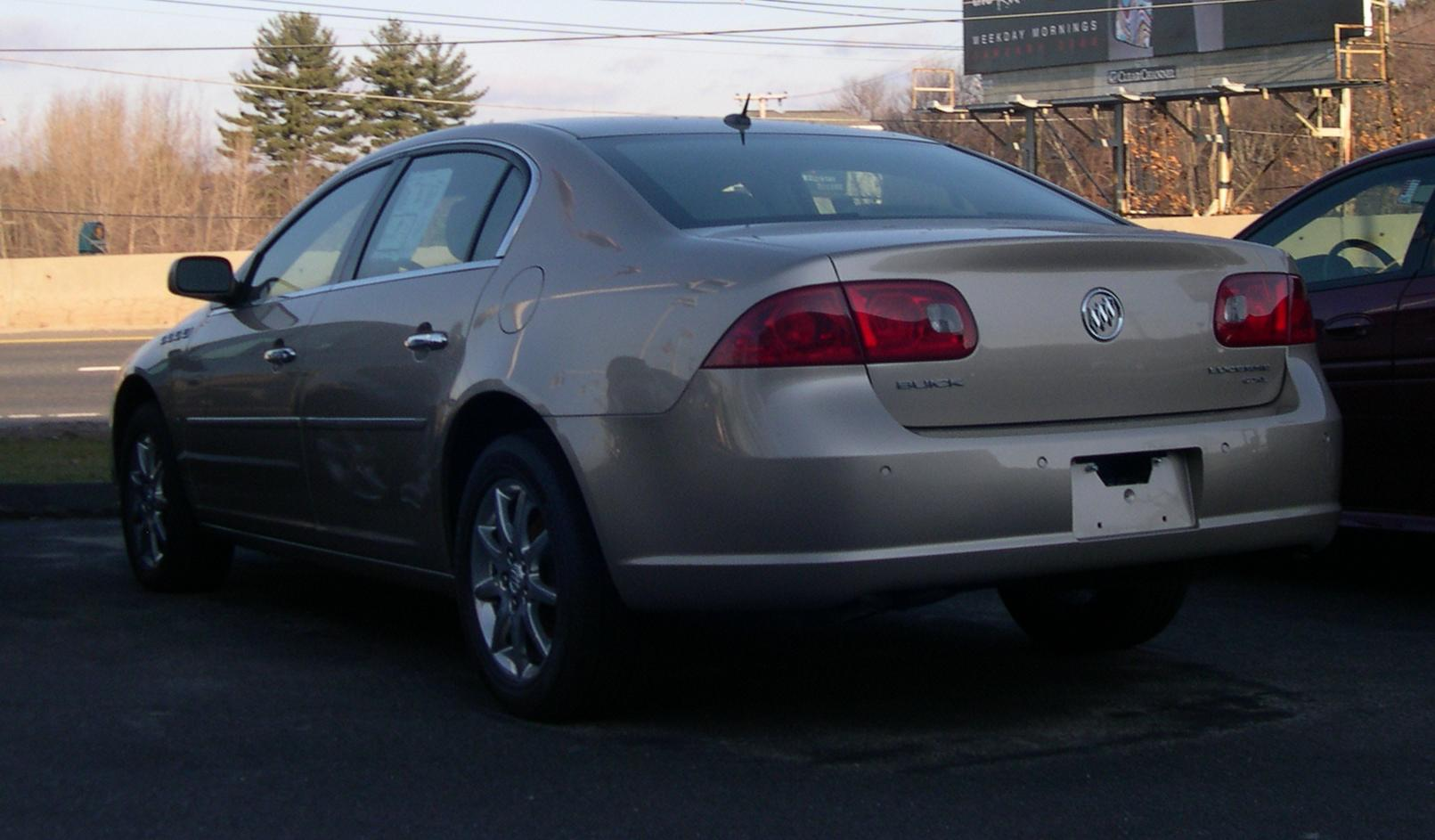 2006 Buick Lucerne